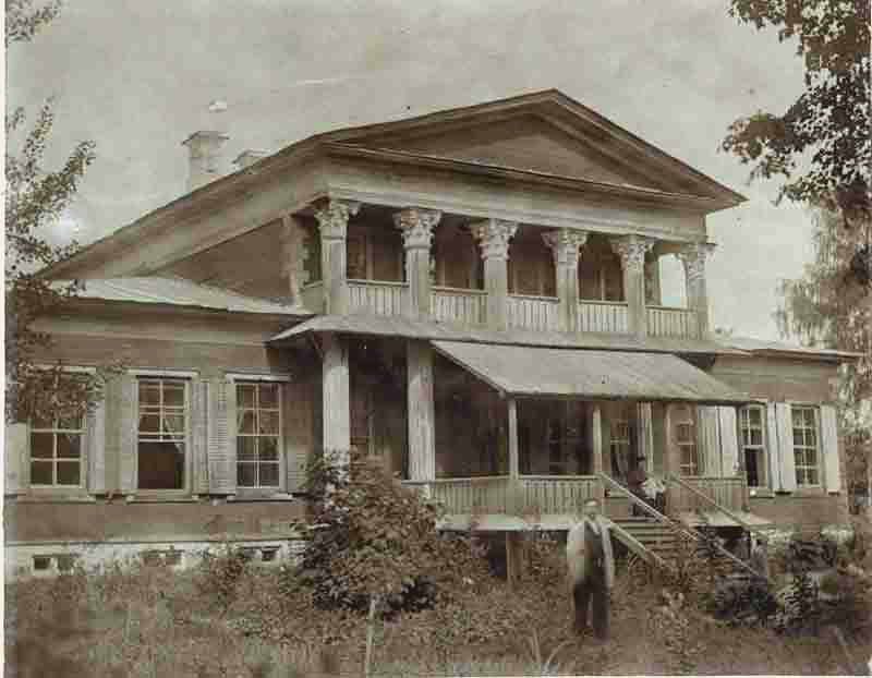 Спасское, родовая усадьба князей Урусовых в Ярославском уезде (начало XIX века, в 2011 разломана на бревна руководством областной психбольницы)